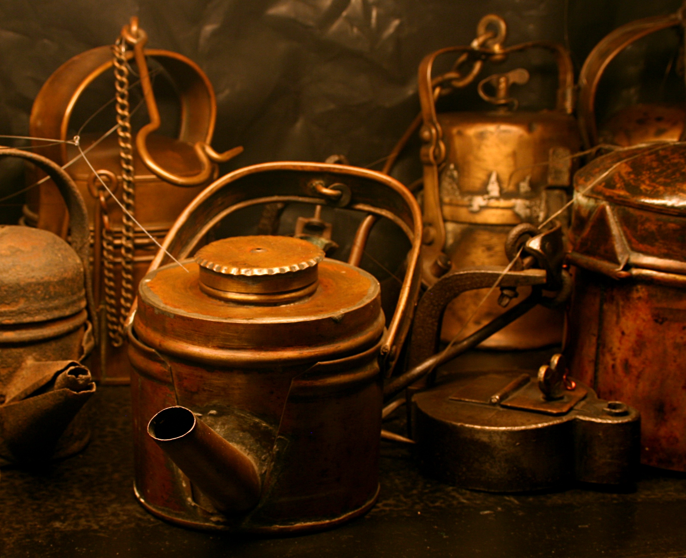 Muzeum w Rybniku podczas Nocy Muzeów. Używane w górnictwie kaganki oliwne o konstrukcji żeliwnej.